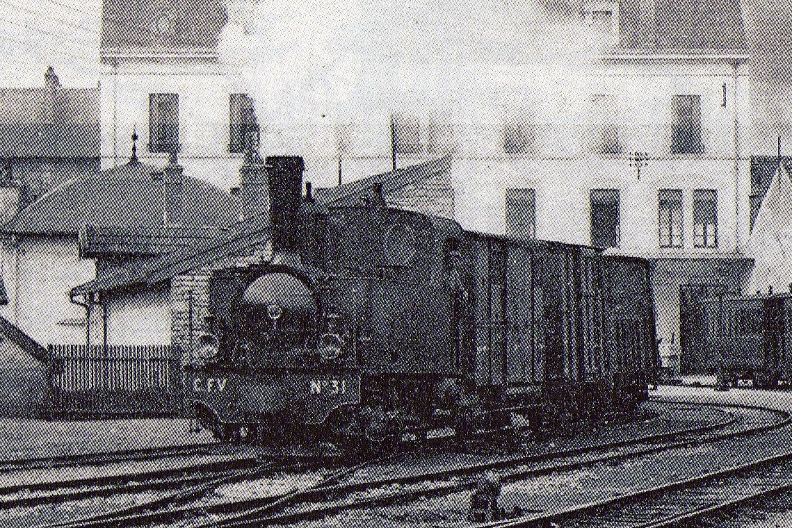 locomotive Corpet Louvet 030T Numéro de série 1305 ligne VESOUL MOLAY